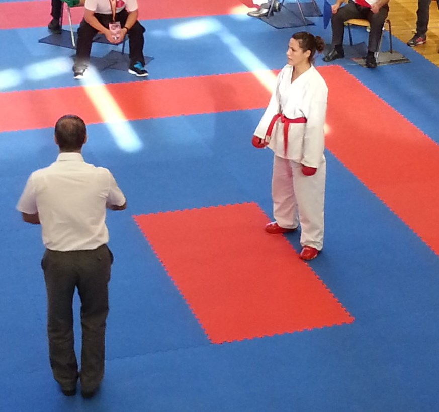 Karate-Champion Saskia Hummel